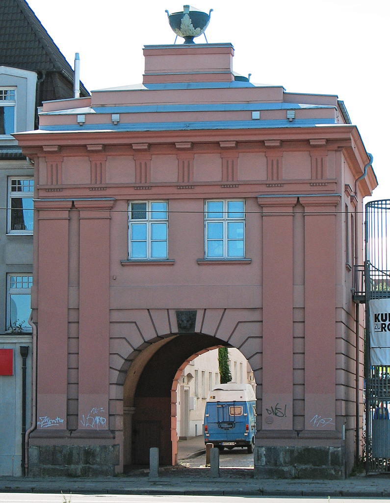 Beschreibung: Mönchentor in Rostock / Germany Fotograf: Darkone, 17. August 2005